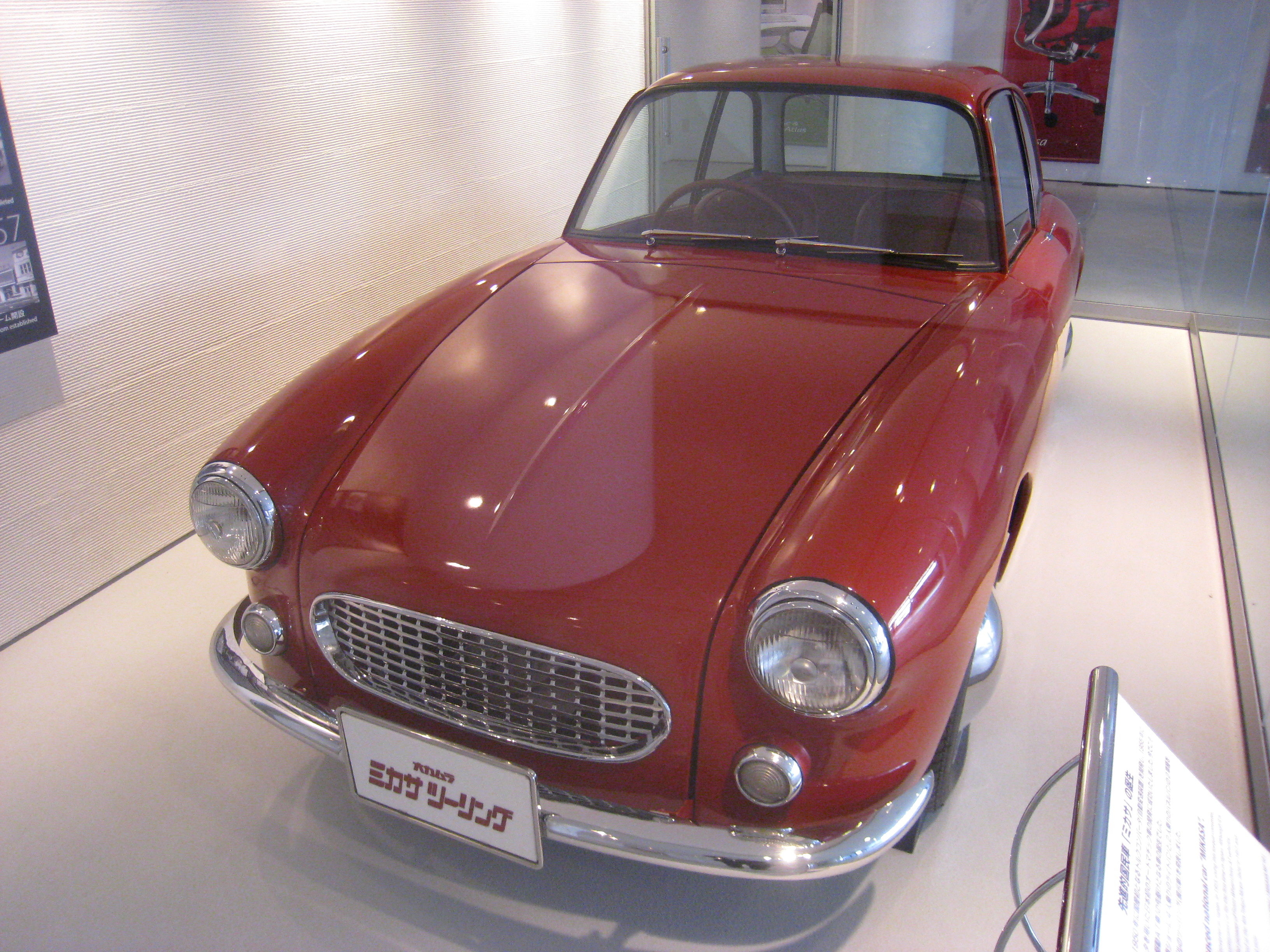 Okamura Mikasa, Okamura building, Tokyo, Japan.